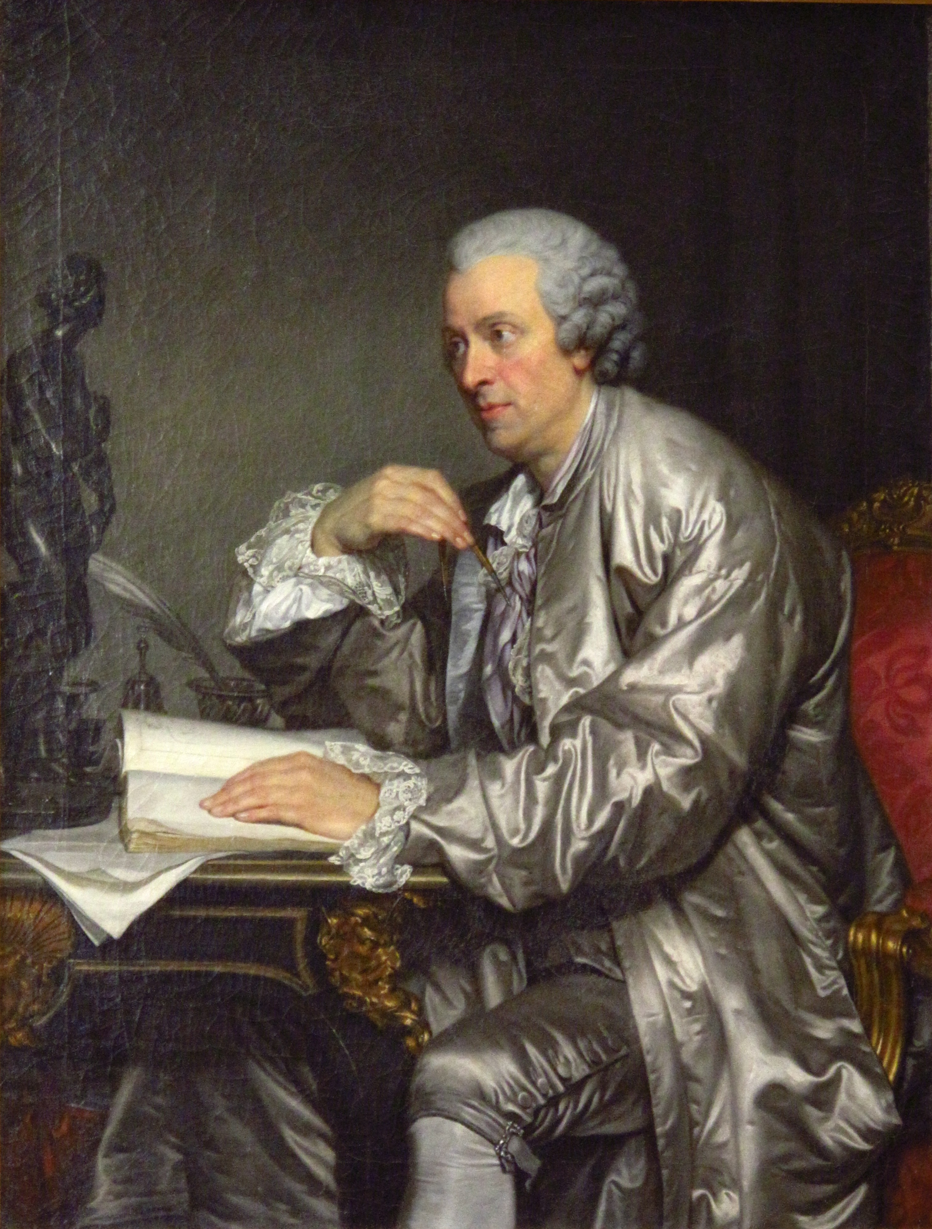 Le financier et amateur Watelet (1718 - 1786) mesure au compas une réduction en bronze de la Vénus Médicis, peut-être pour préparer la gravure qui illustre son Art de peindre, paru en 1760.